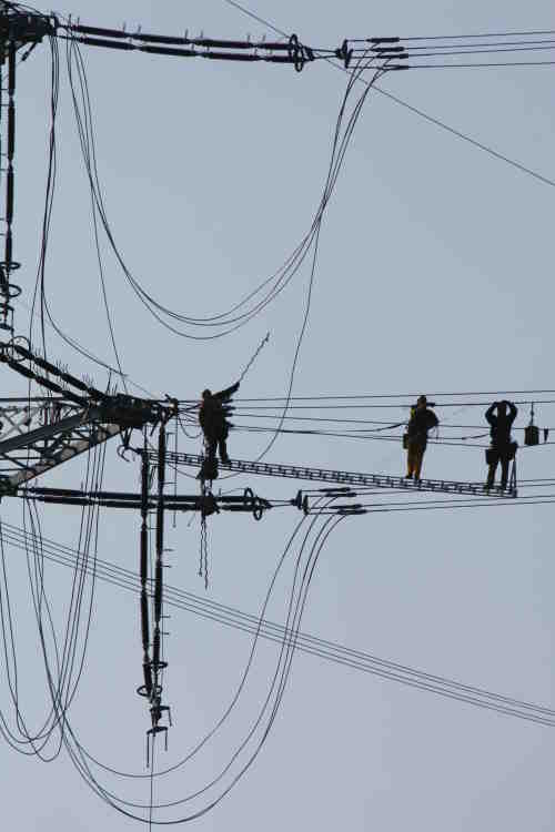 Montagearbeiten an Freileitungsseilen - Essen, Berthold Beitz Boulevard (380 kV, Bl 4125)